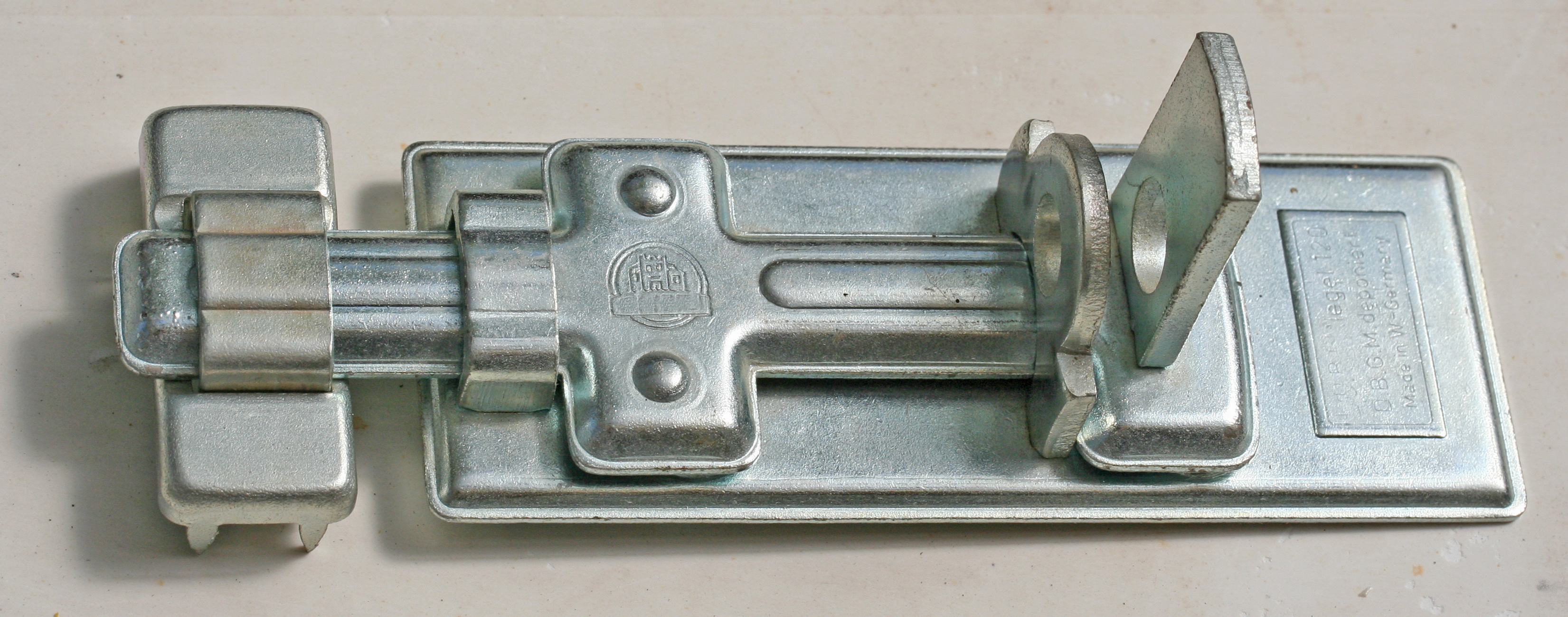 Reedel.